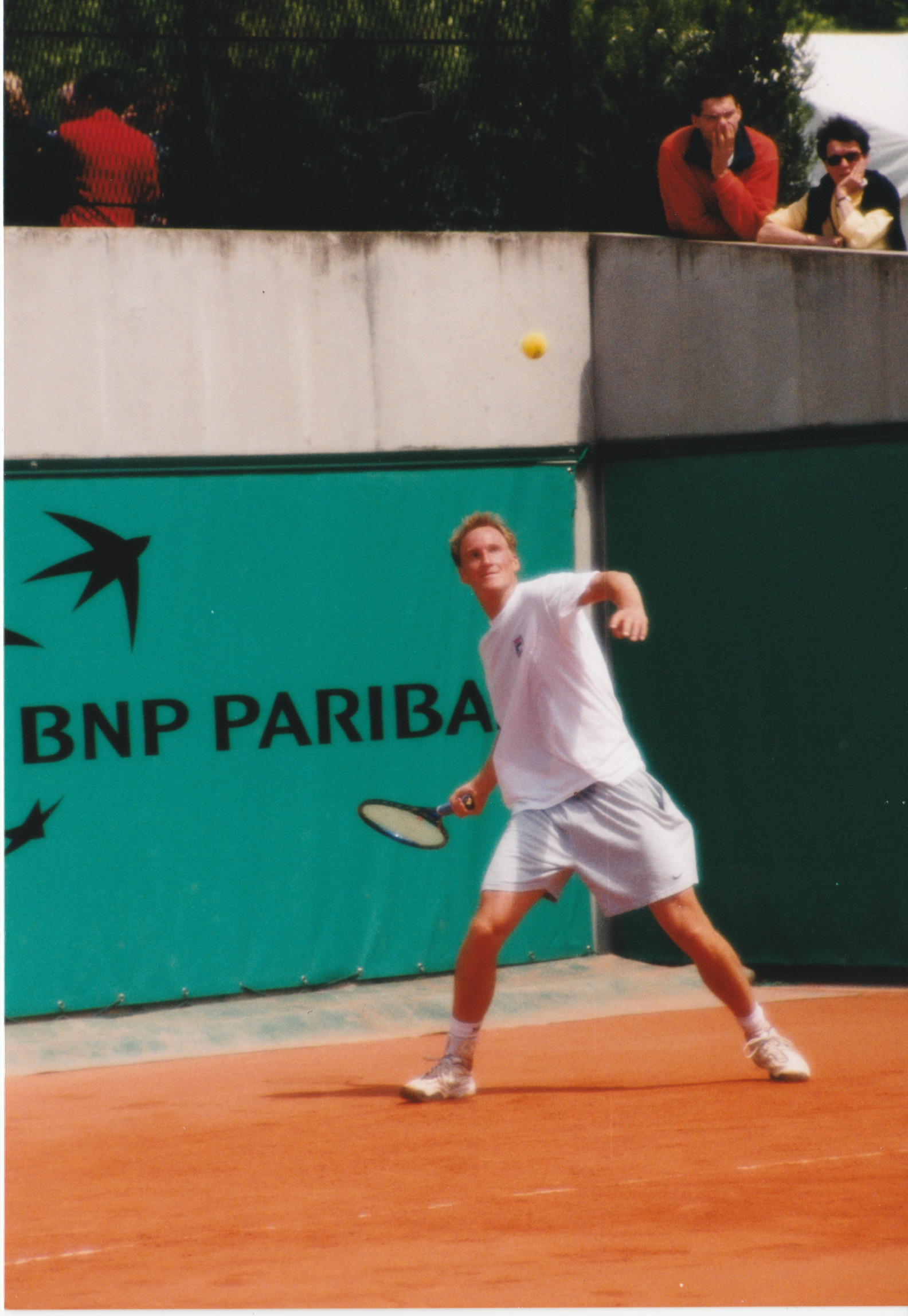 Christian Ruud slår en forehand i French Open 2000.